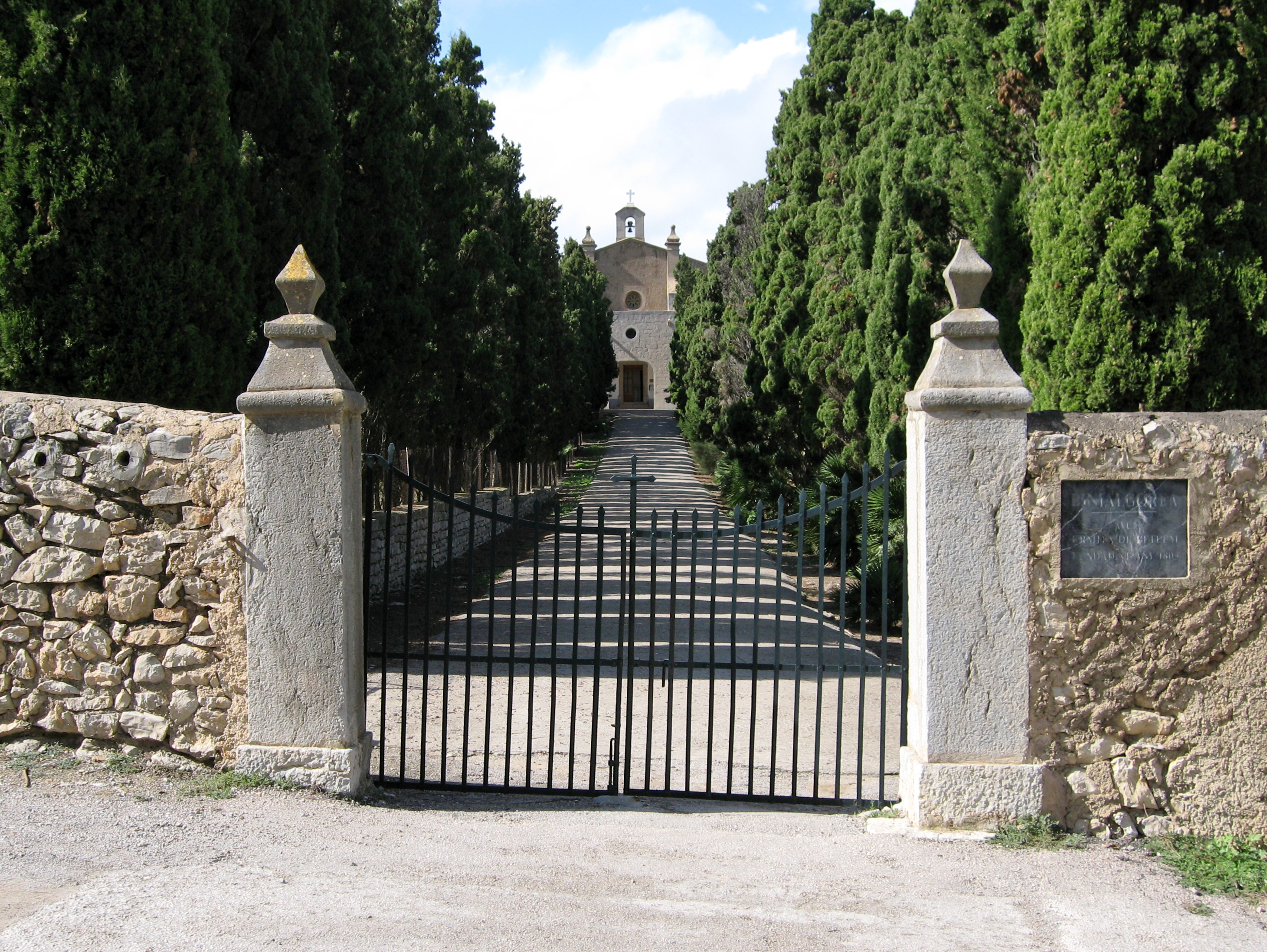 Ermita de Betlem, Artà, Mallorca, Spain